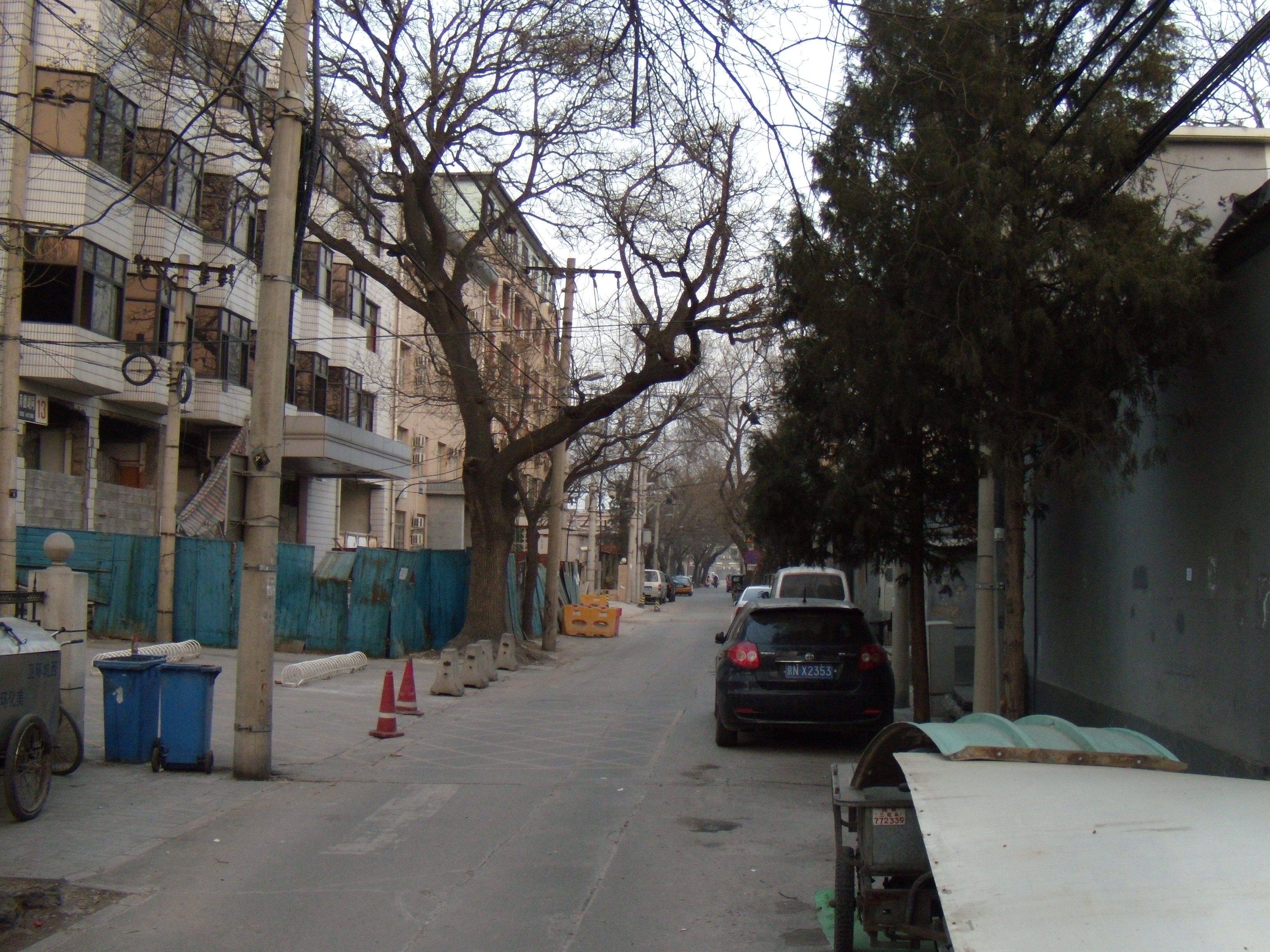 育德胡同